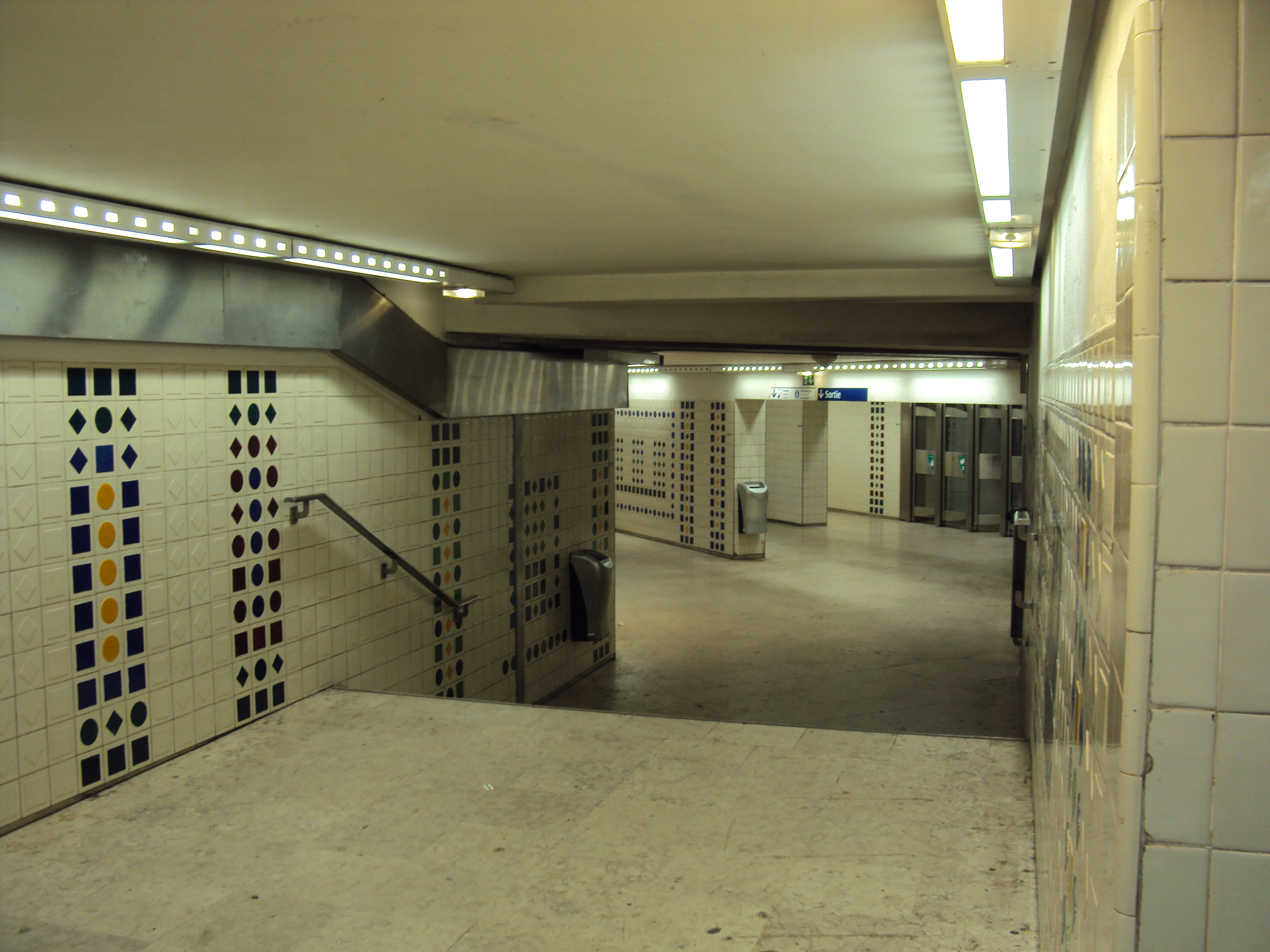 Fresques du couloir de correspondance de la station de métro Franklin Roosevelt, Paris